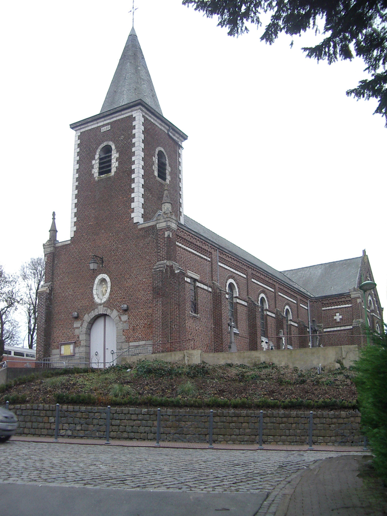 Eglise Notre-Dame de la Visitation de Gruson Nord.- France.